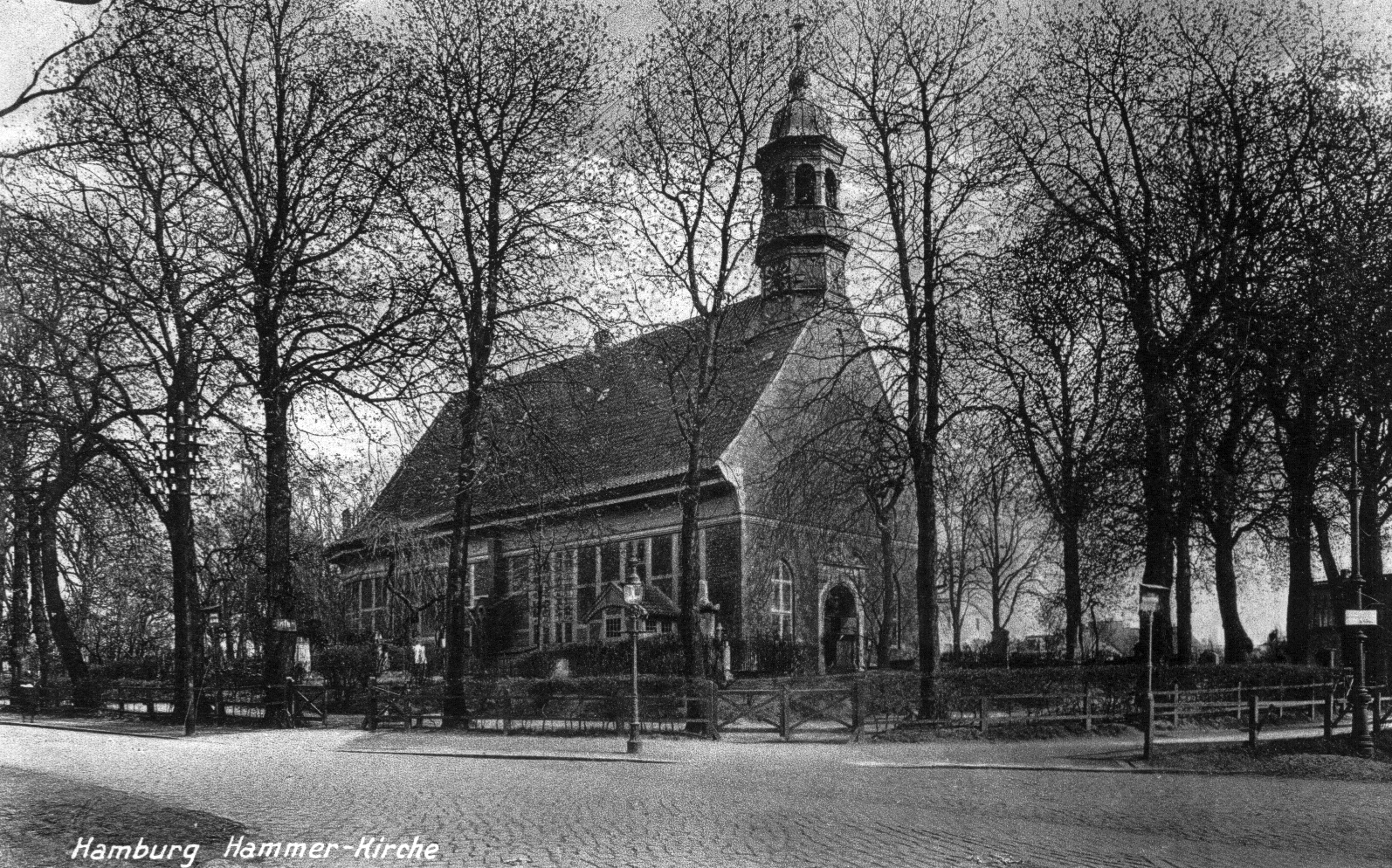 Die Alte Dreifaltigkeitskirche von 1693 in Hamburg-Hamm (zerbombt im Feuersturm im Juli 1943)